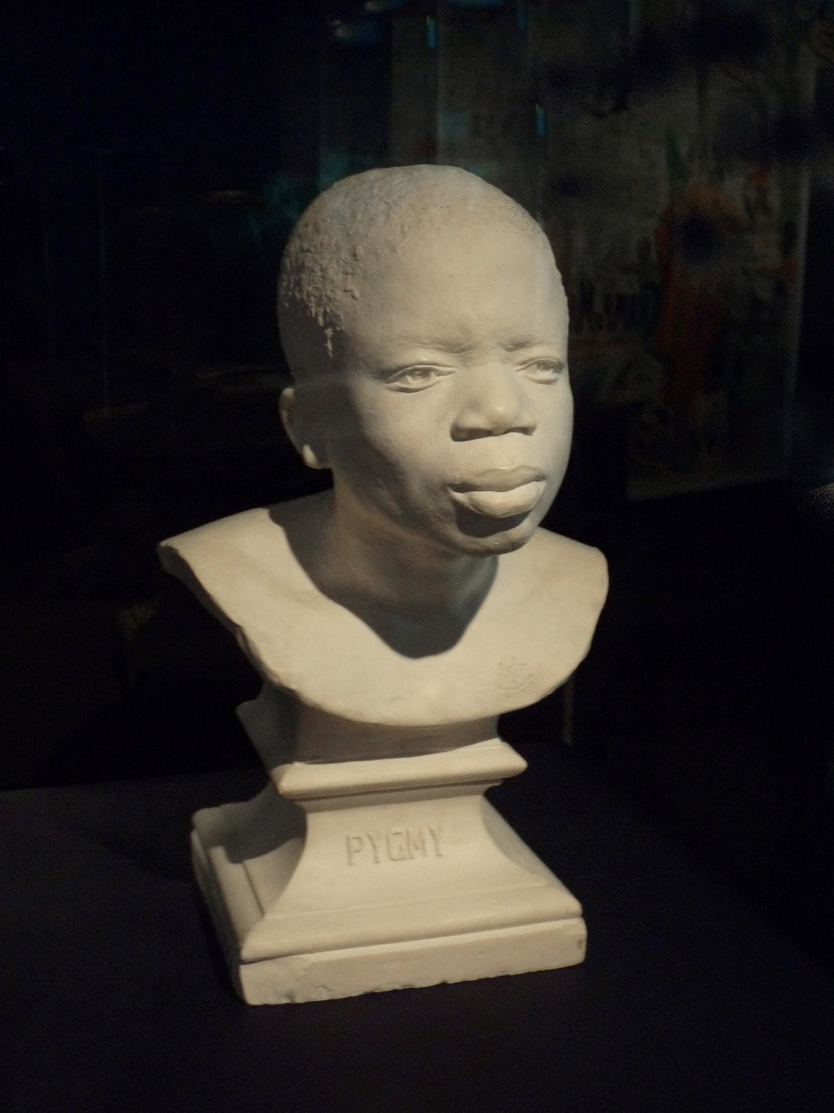 Buste d'Ota Benga, plâtre, par Casper Mayer (1871-1931), 1906, American Museum of Natural History, New York (exposition temporaire Exhibitions. L'invention du sauvage au Musée du quai Branly).